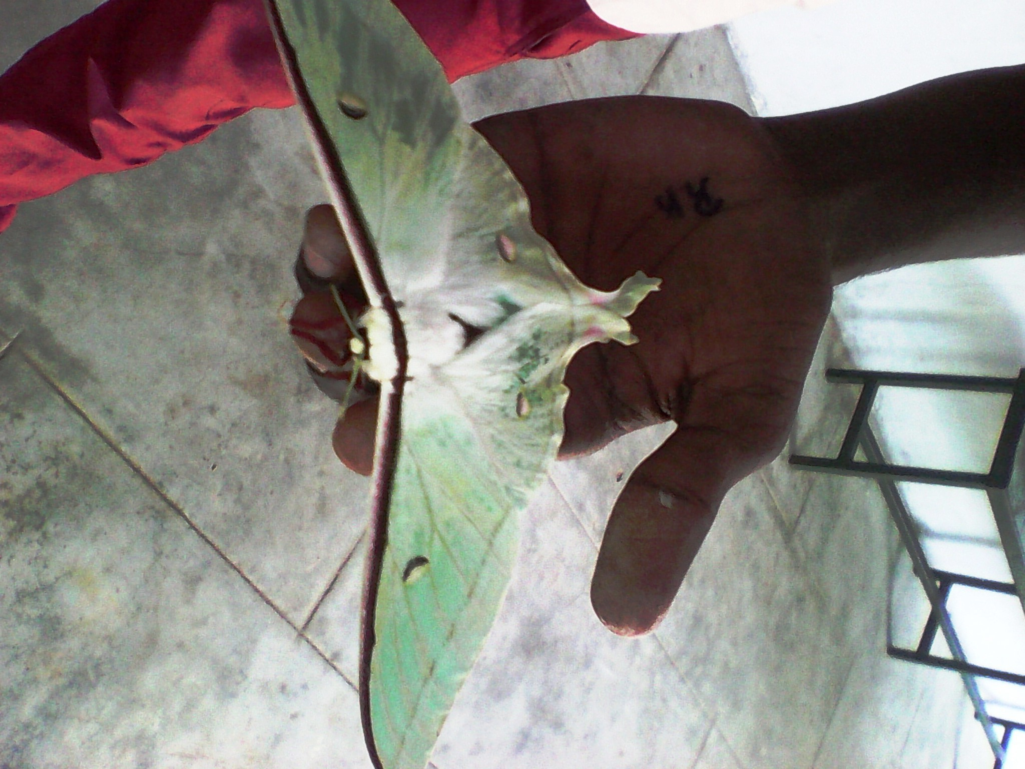 This beautiful luna moth was found in our school, Govt higher secondary school, Thirupputkuzhi, Kanchipuram district